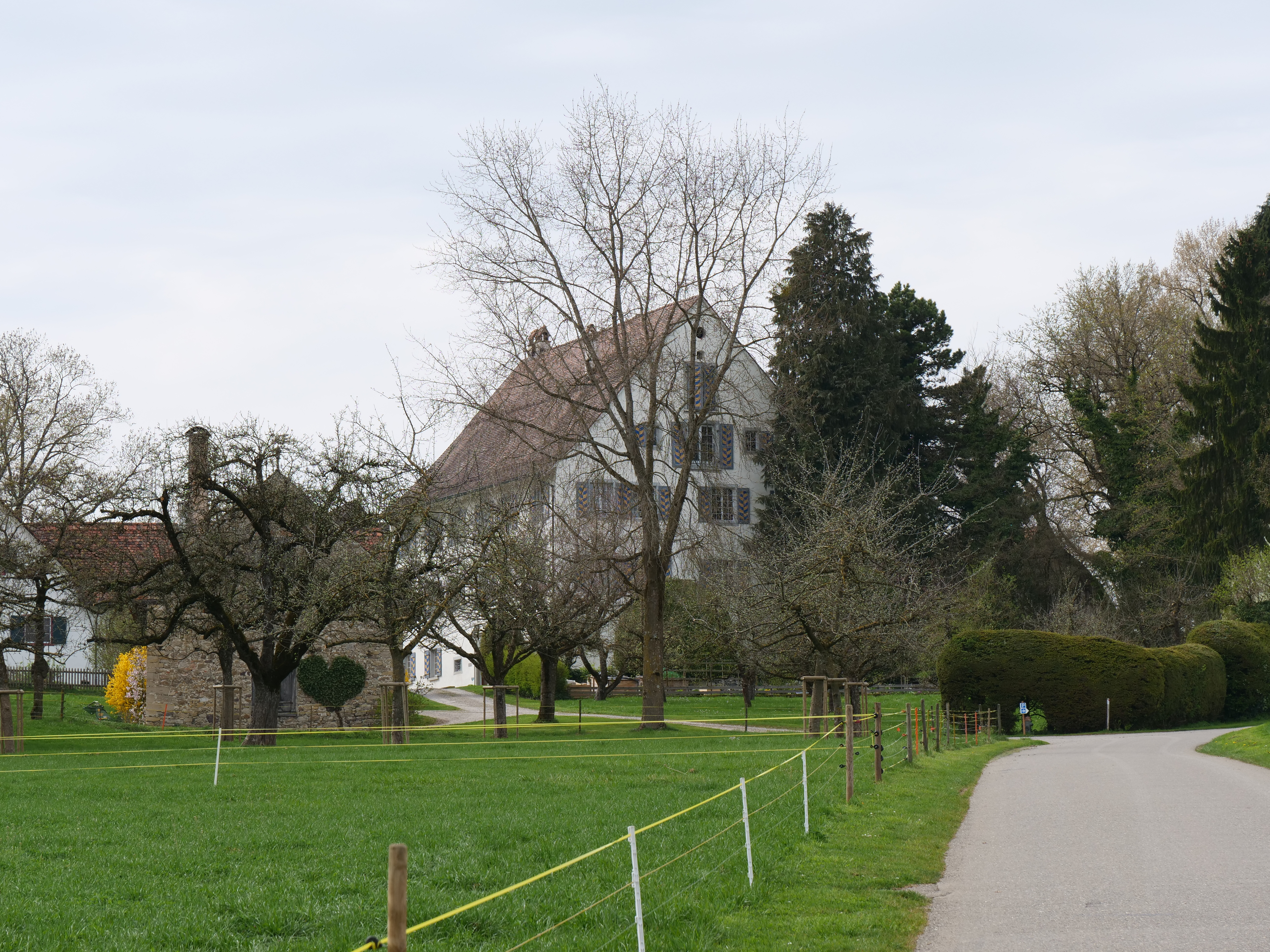 Schloss Gündelhart, erbaut um 1646